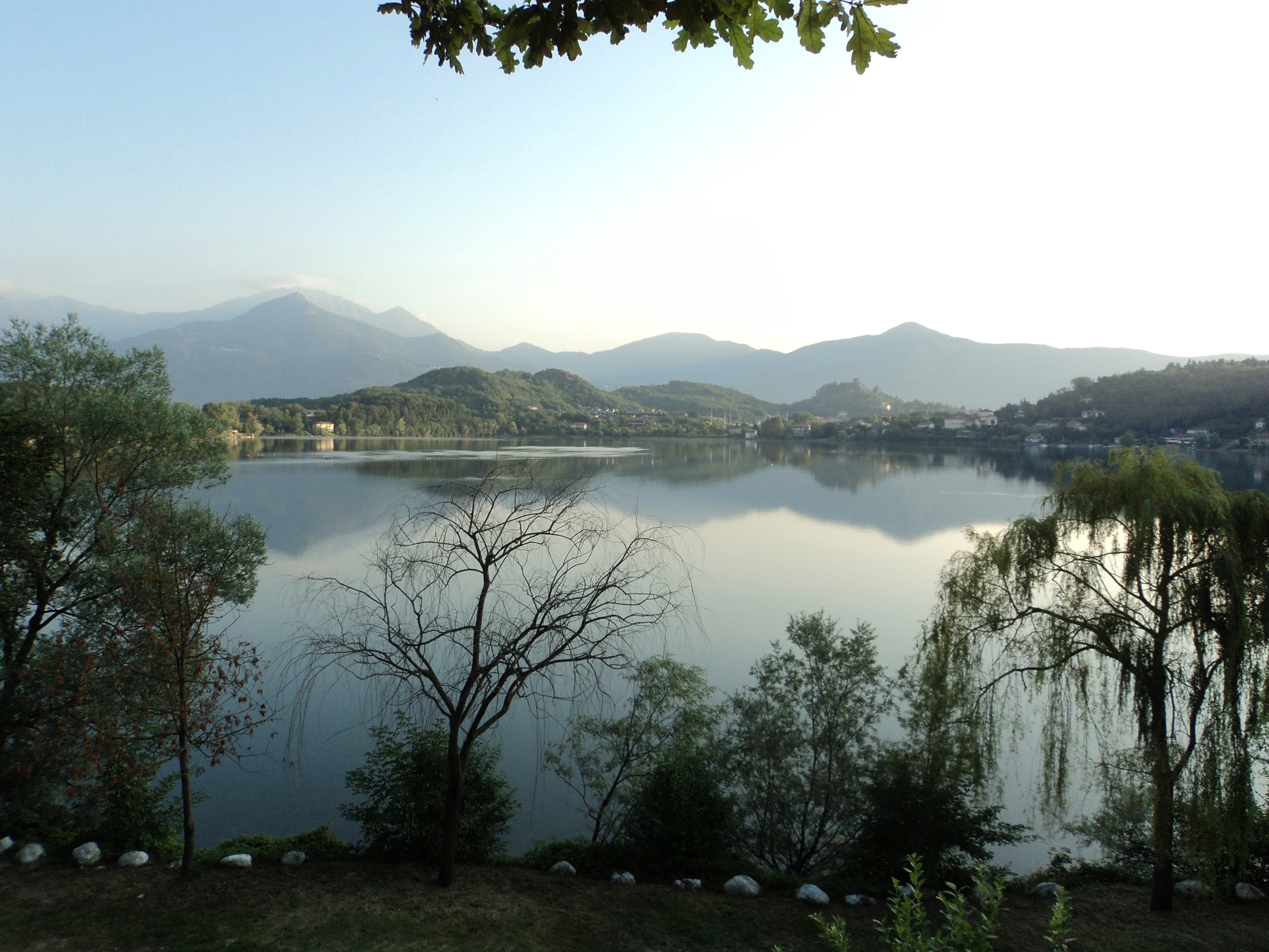 Lago Grande di Avigliana - Provincia di Torino - Piemonte